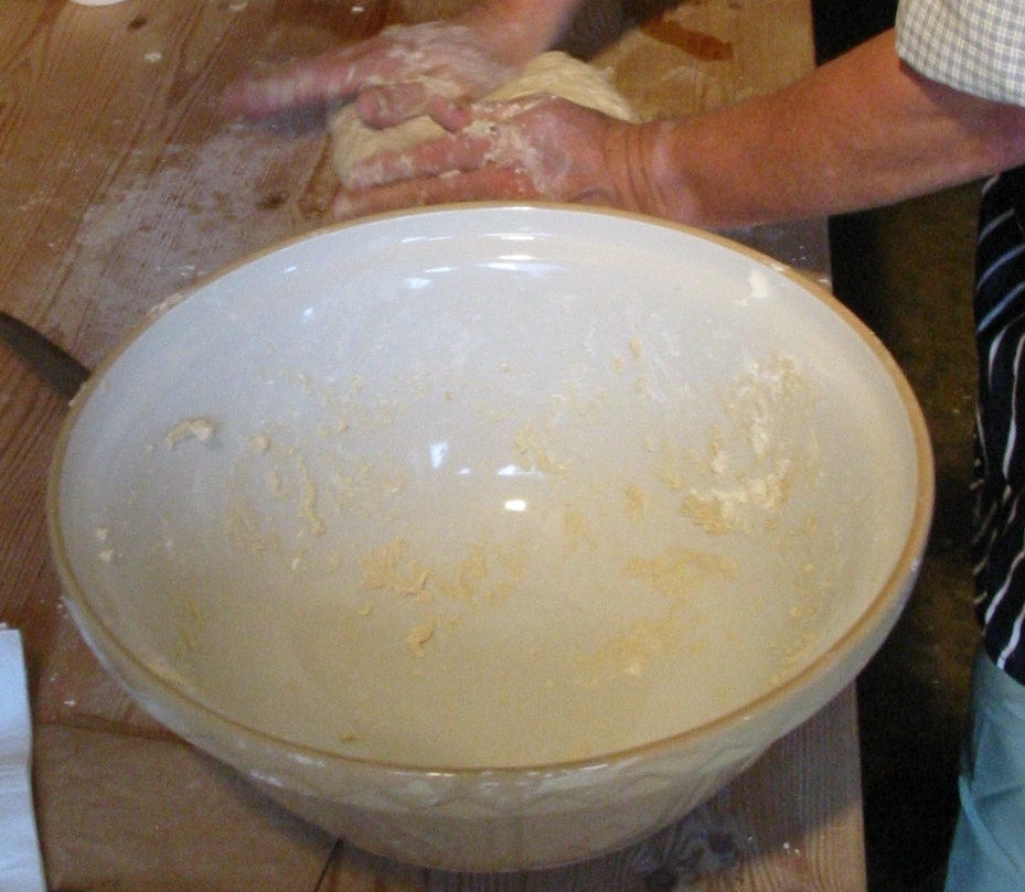 Des pains Jèrriais à Hamptonne, La Faîs'sie d'Cidre 2007